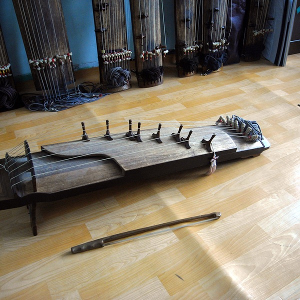 산조 연주용 아쟁